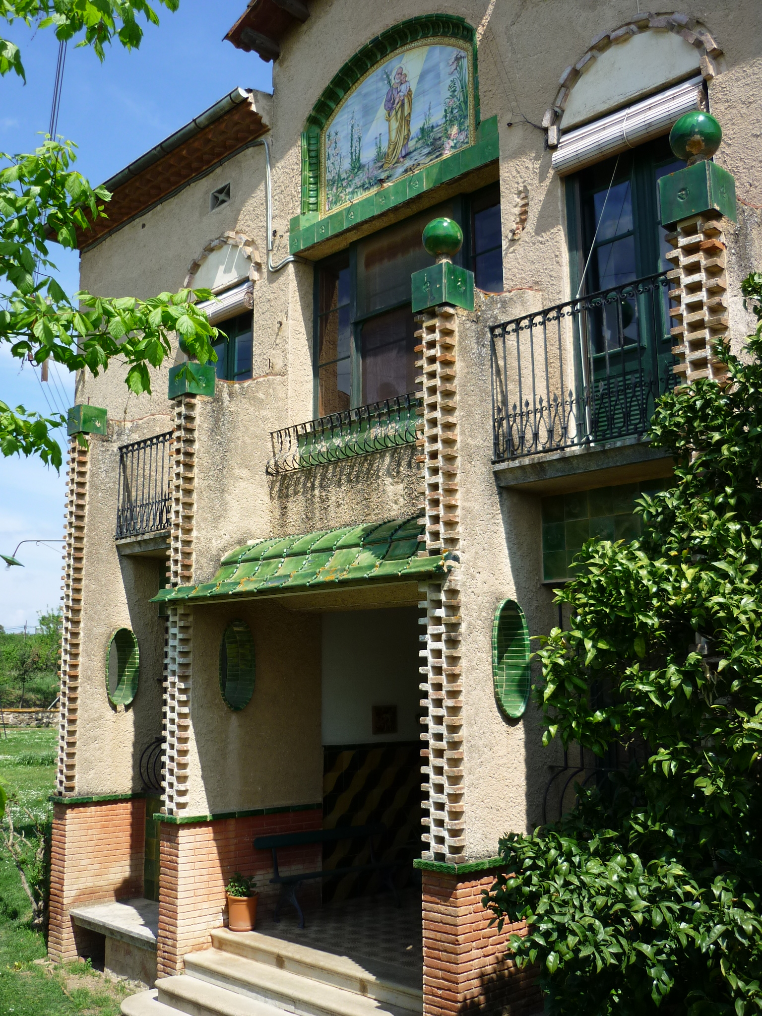 Ampliació d'un mas